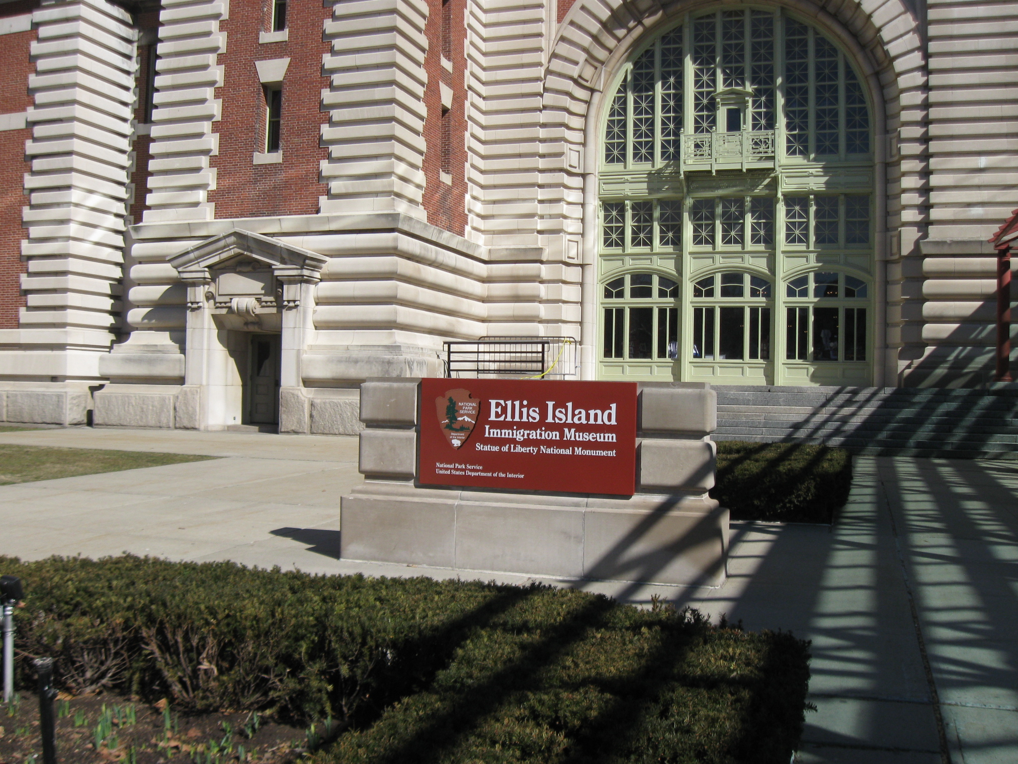 Ellis adasında bununan göçmen müzesi